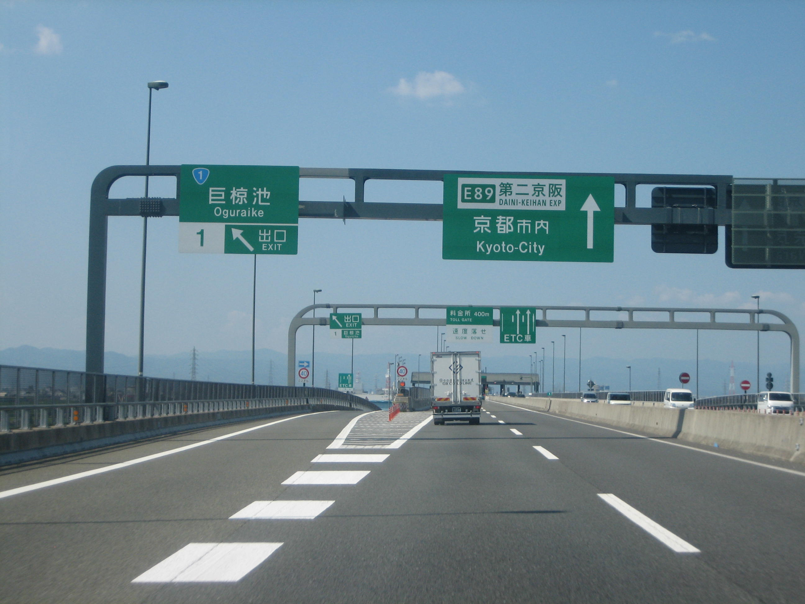 巨椋池IC